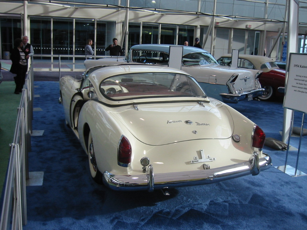 (1954?) Kaiser Darrin (rear)